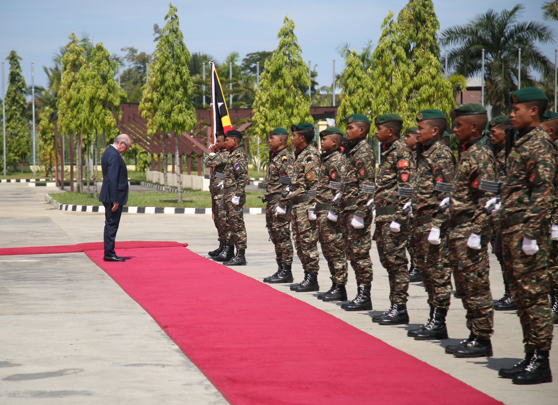 Olivier Chambard, französischer Botschafter in Osttimor, am Tag der Übergabe seiner Akkreditierung.